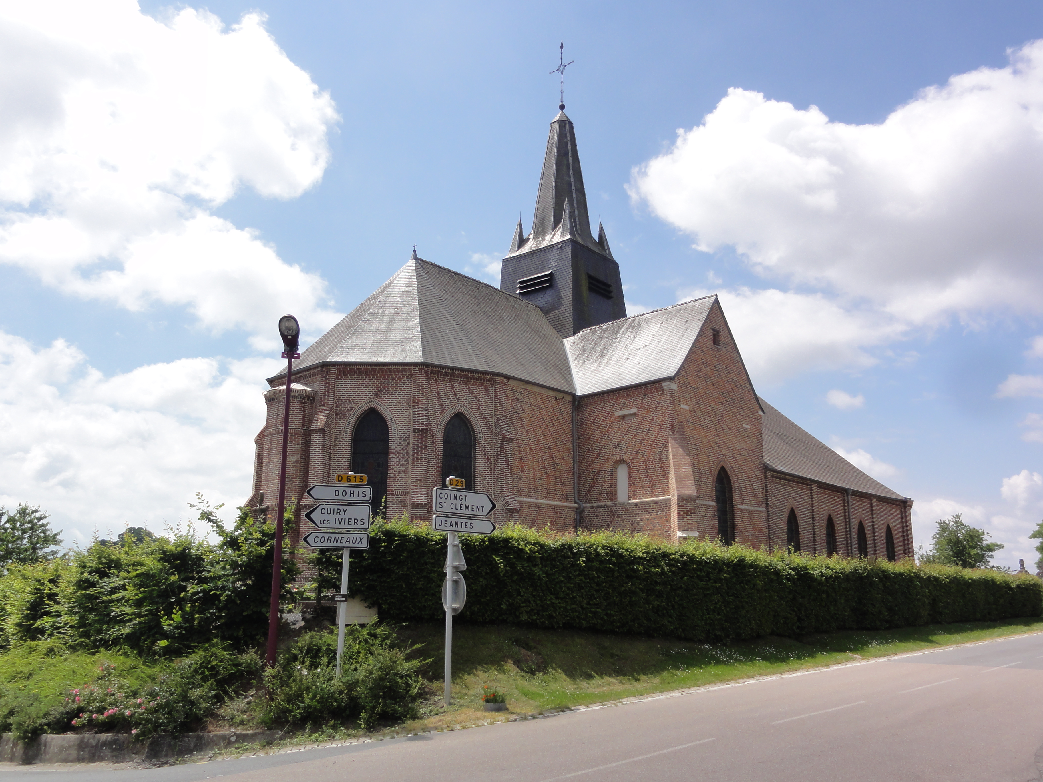 Iviers (Aisne) église